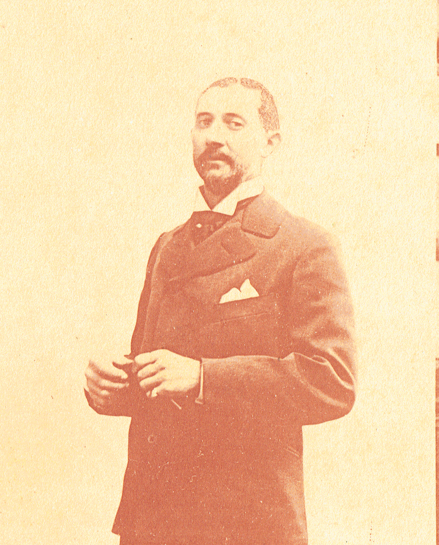 Portrait en buste de Jean-Alfred Marioton, détail d'un portrait photographique en pied.